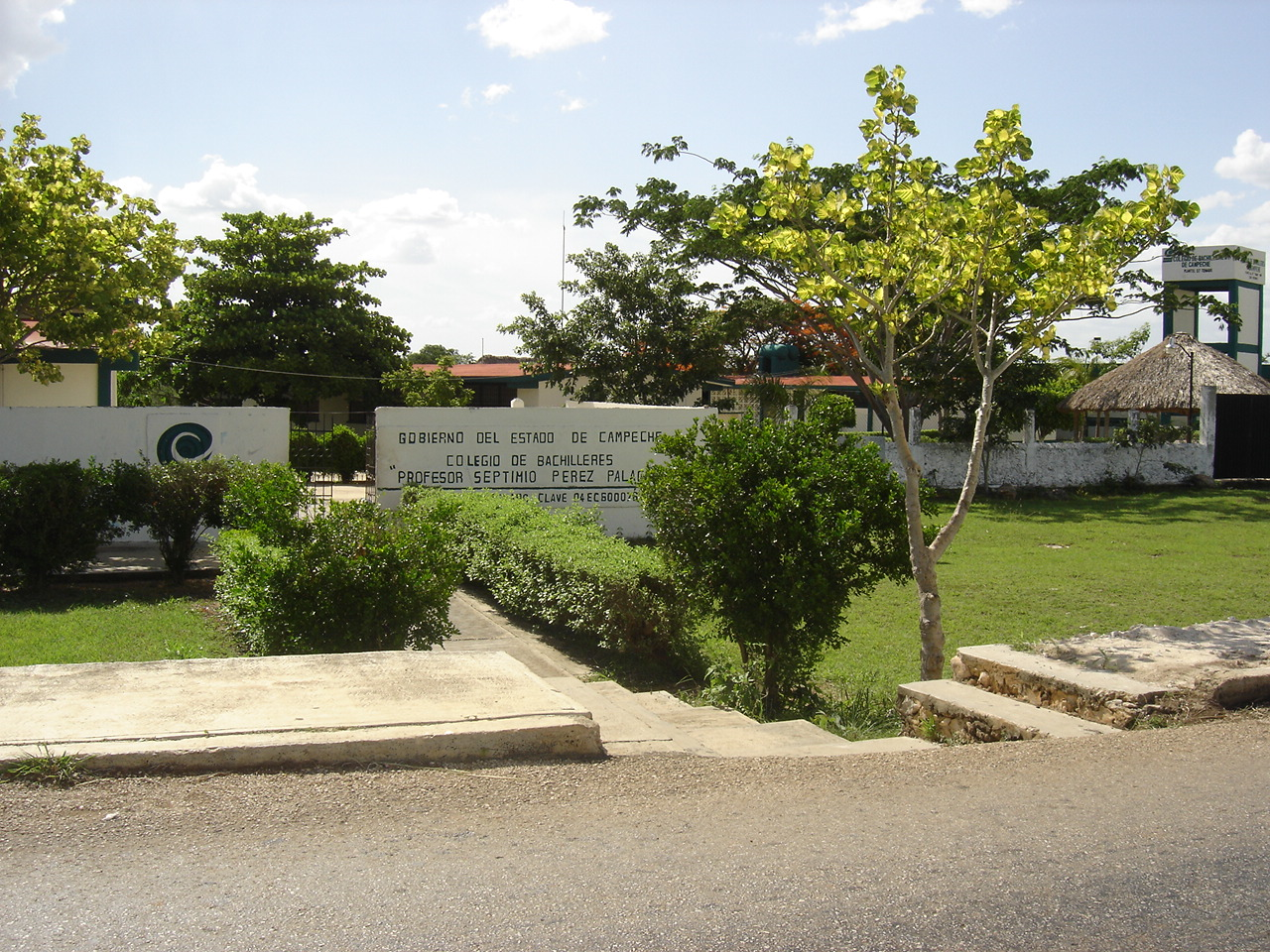 COBACH 07 Colegio de Bachilleres de Tenabo.